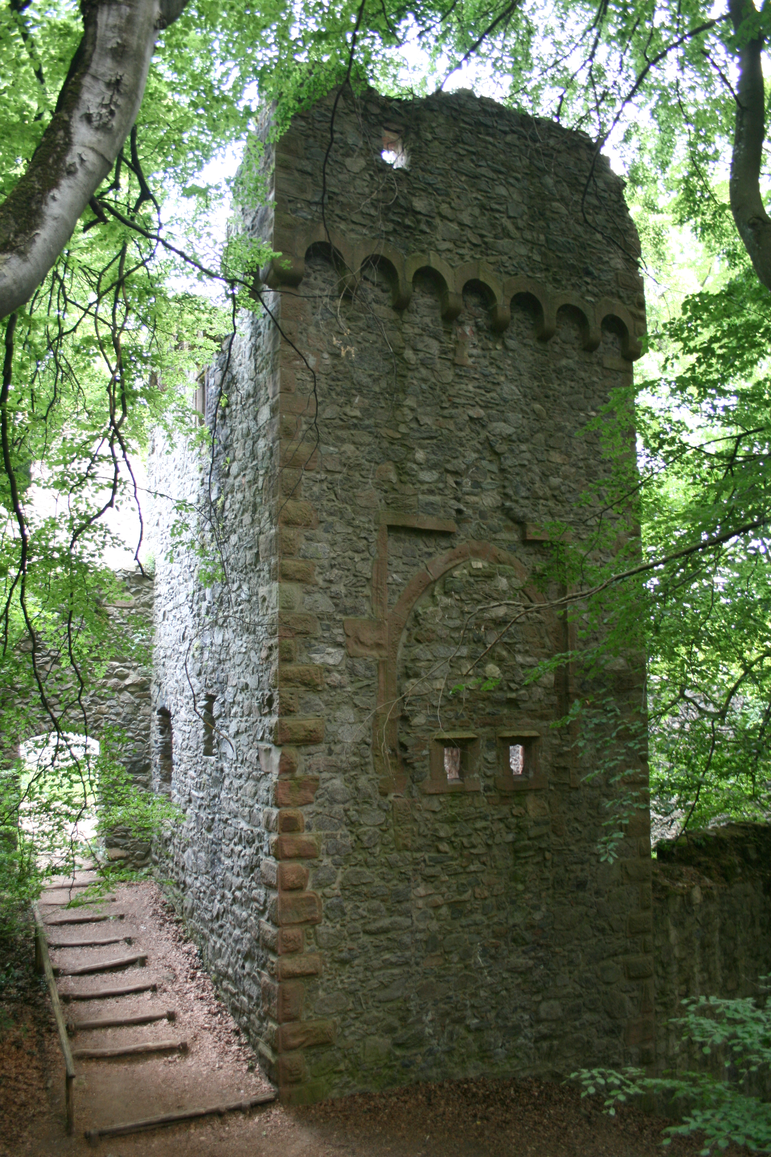 Burg Rodenstein, Außenseite des sogenannten Mühlturms mit vermauertem, früherem Tor.